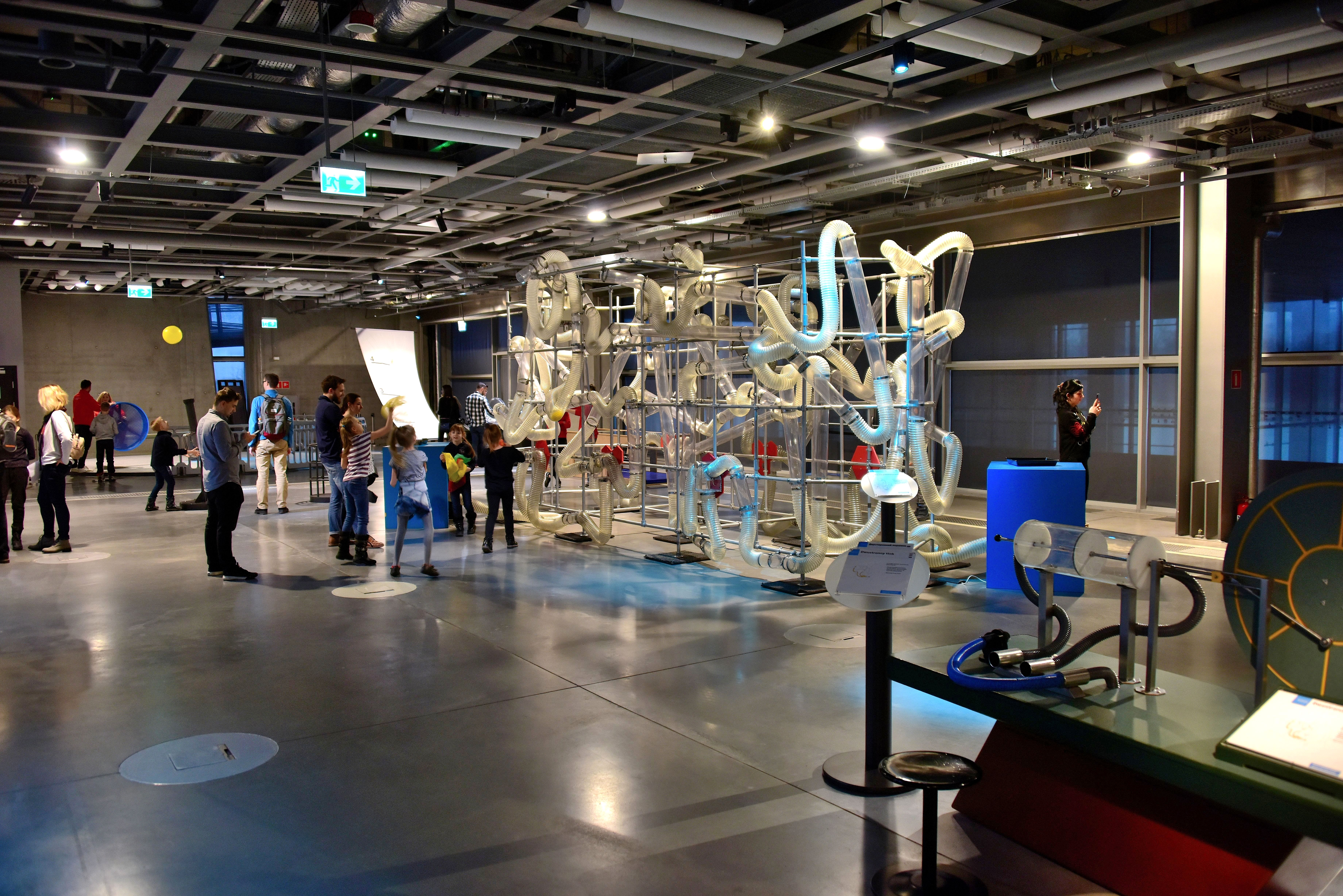 Centrum Nauki Kopernik w Warszawie